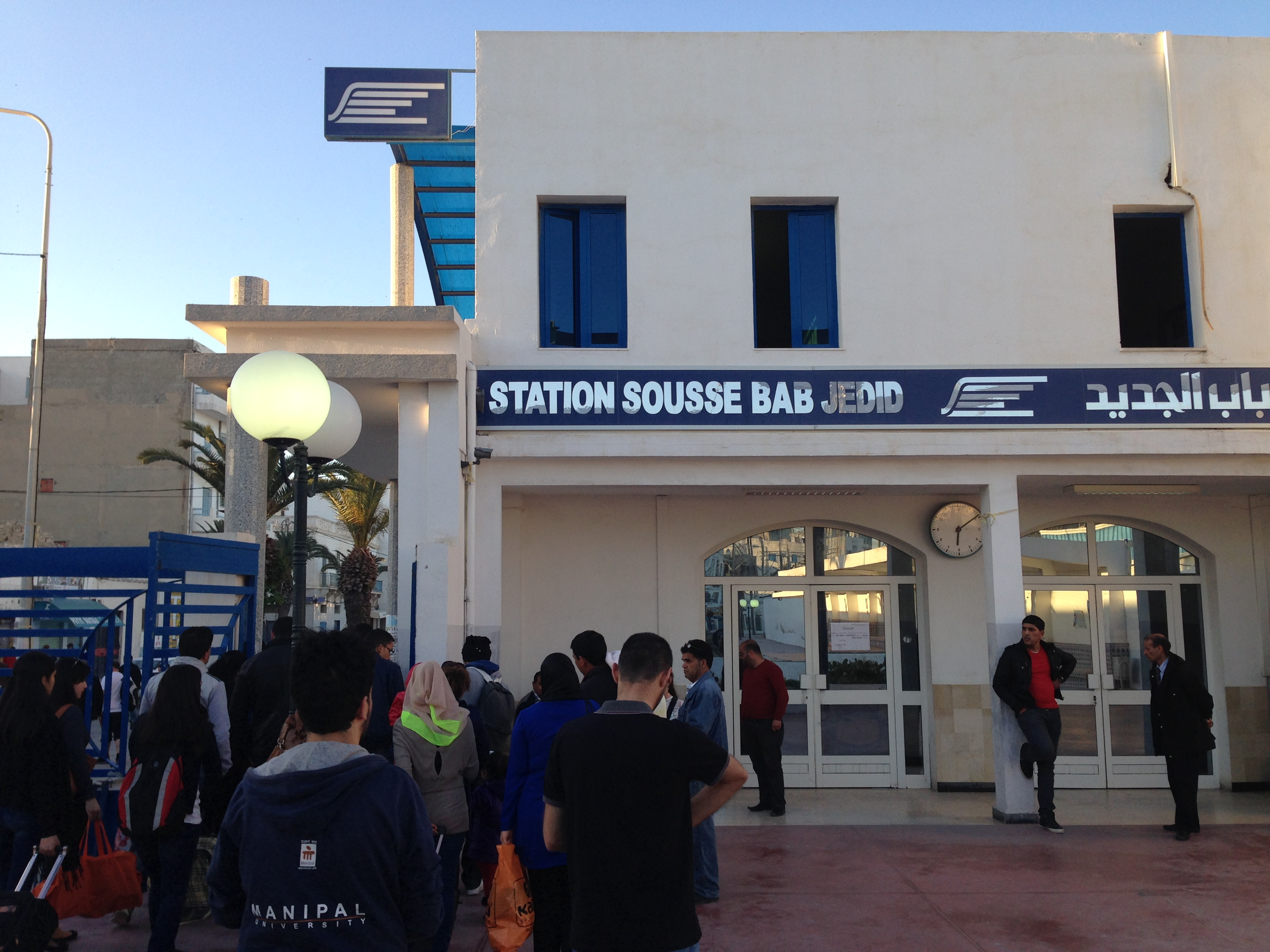 Station Sousse Bab Jedid du métro du Sahel (Tunisie)